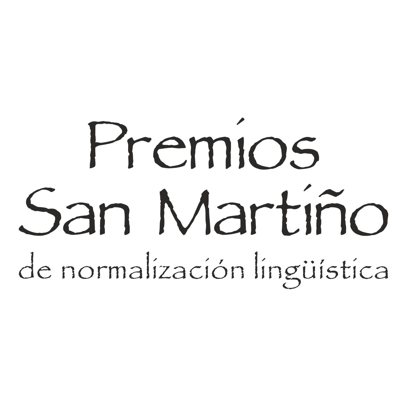 Premios San Martiño de normalización lingüística